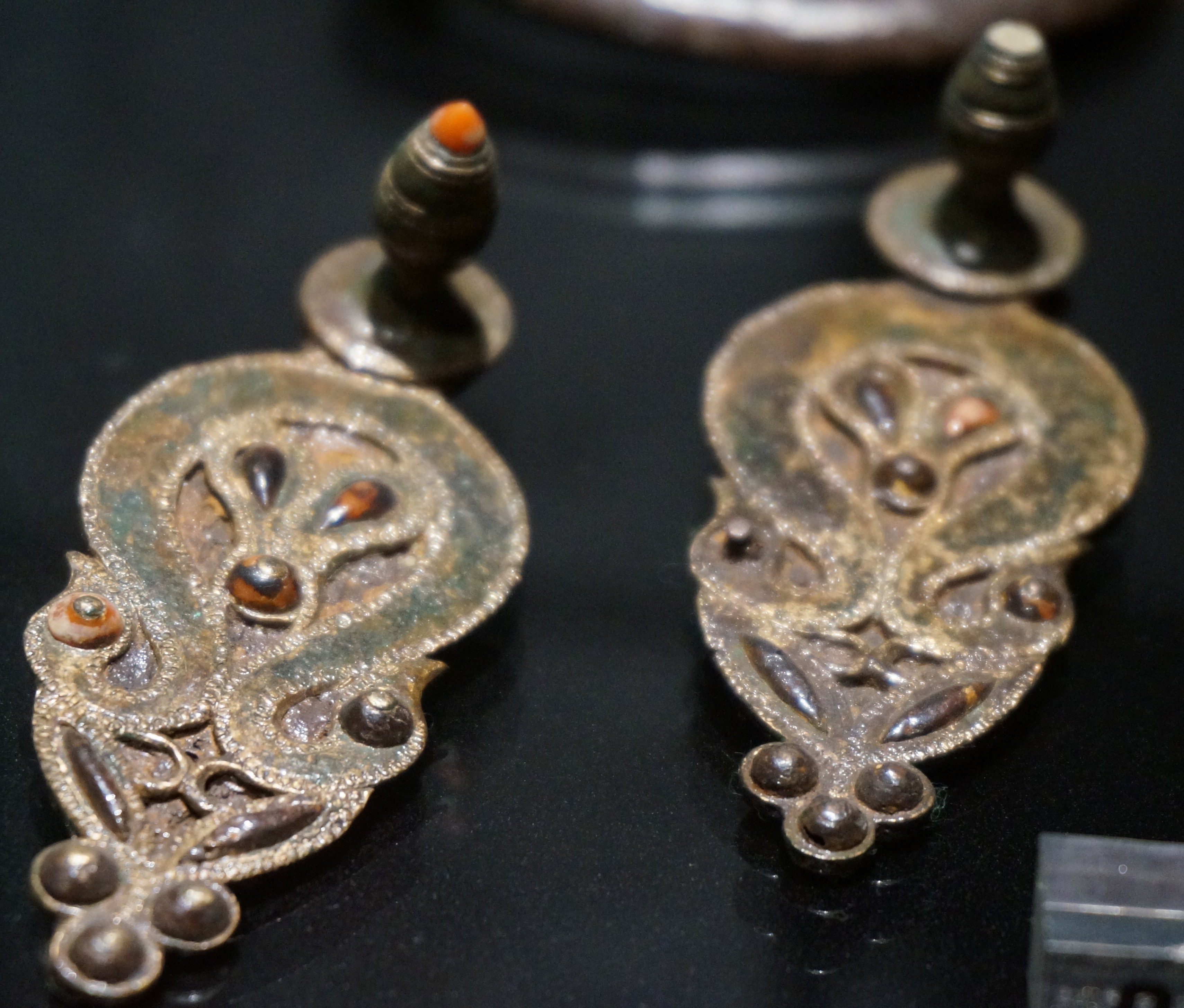 Appliques du IVe siècle avant JC, La Tomelle aux Mouches, Sémide.